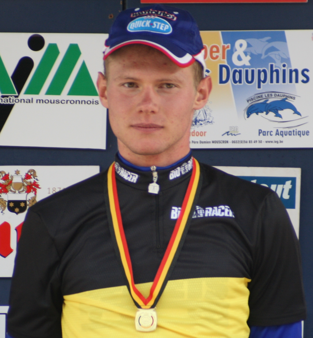 Jan Ghyselinck, au championnat de Belgique du contre-la-montre à Mouscron